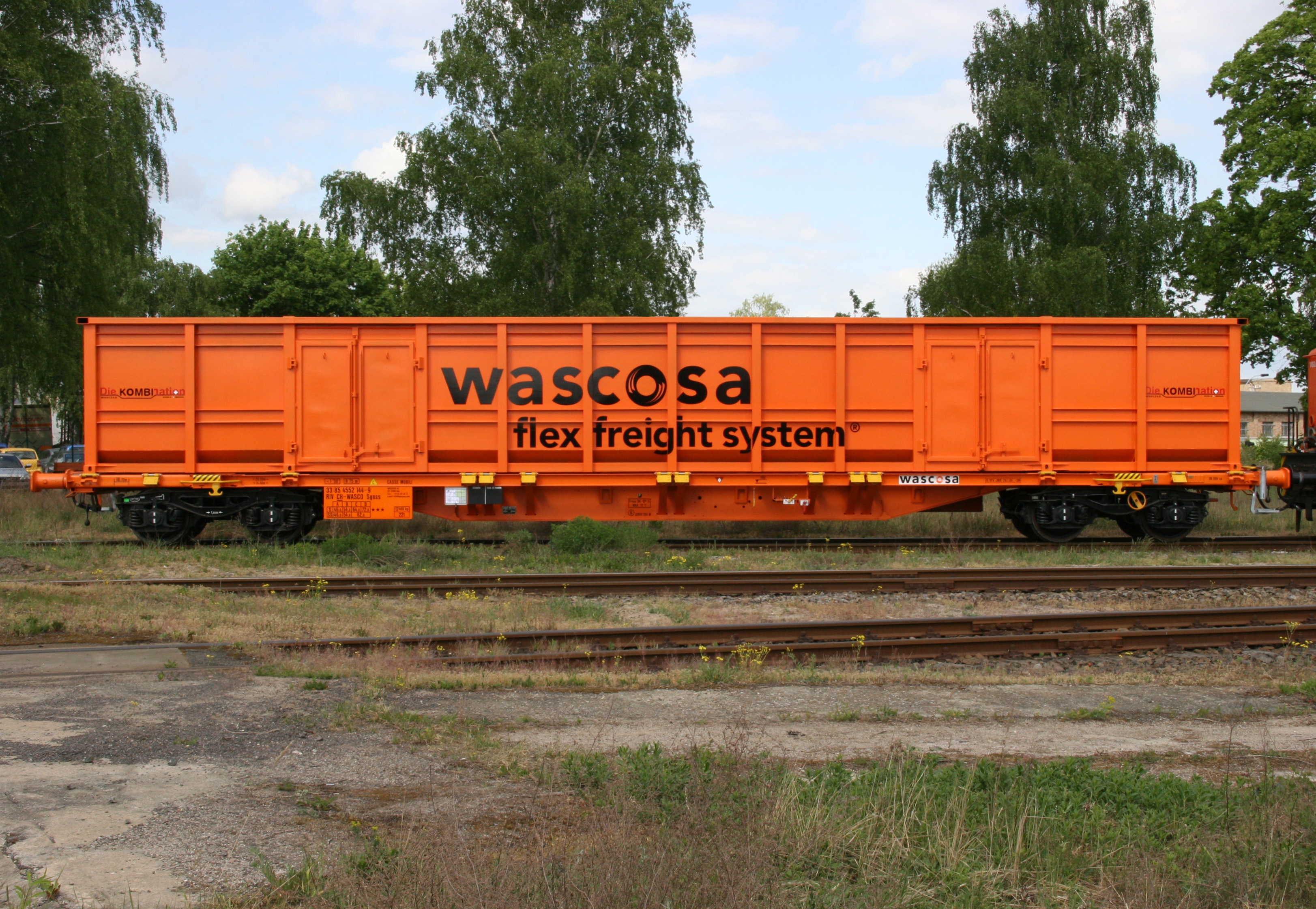 WASCOSA flex freight system® – der Güter-wagen der Zukunft mit Aufbauten nach dem Baukastenprinzip